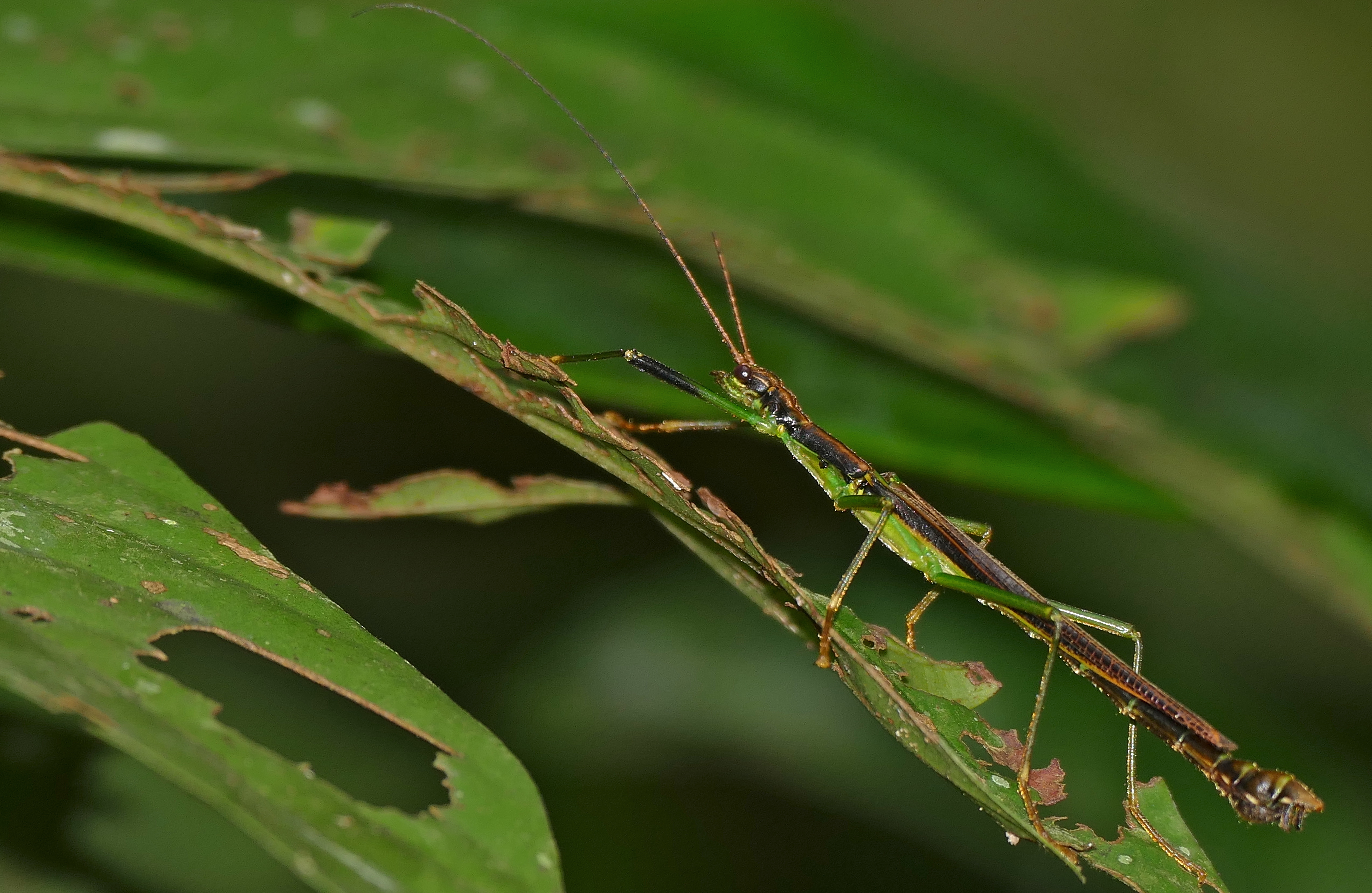 Mulu NP, Sarawak, MALAYSIA